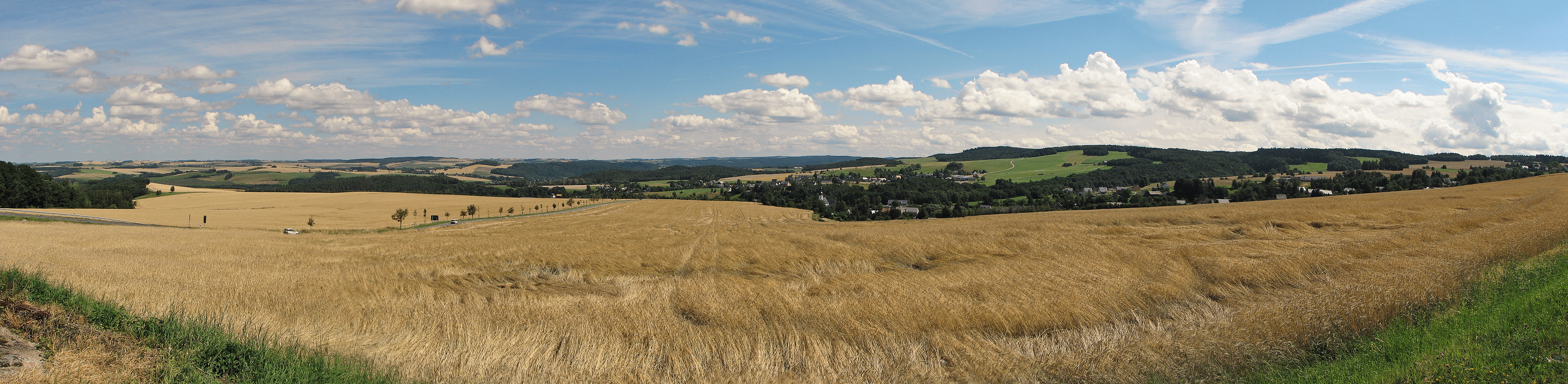 Panorama des Ortsteils Weißbach von Langenweißbach im Erzgebirge, aufgenommen am Rand der B 93